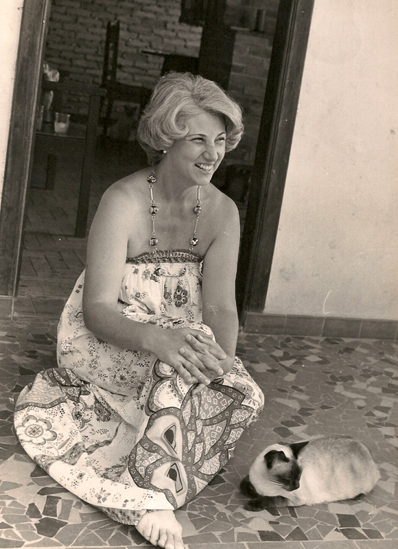 maria jose giglio, casa do escritor, cde, gatos, poeta, poesia, jornal, cds, bazar, literatura, mjg